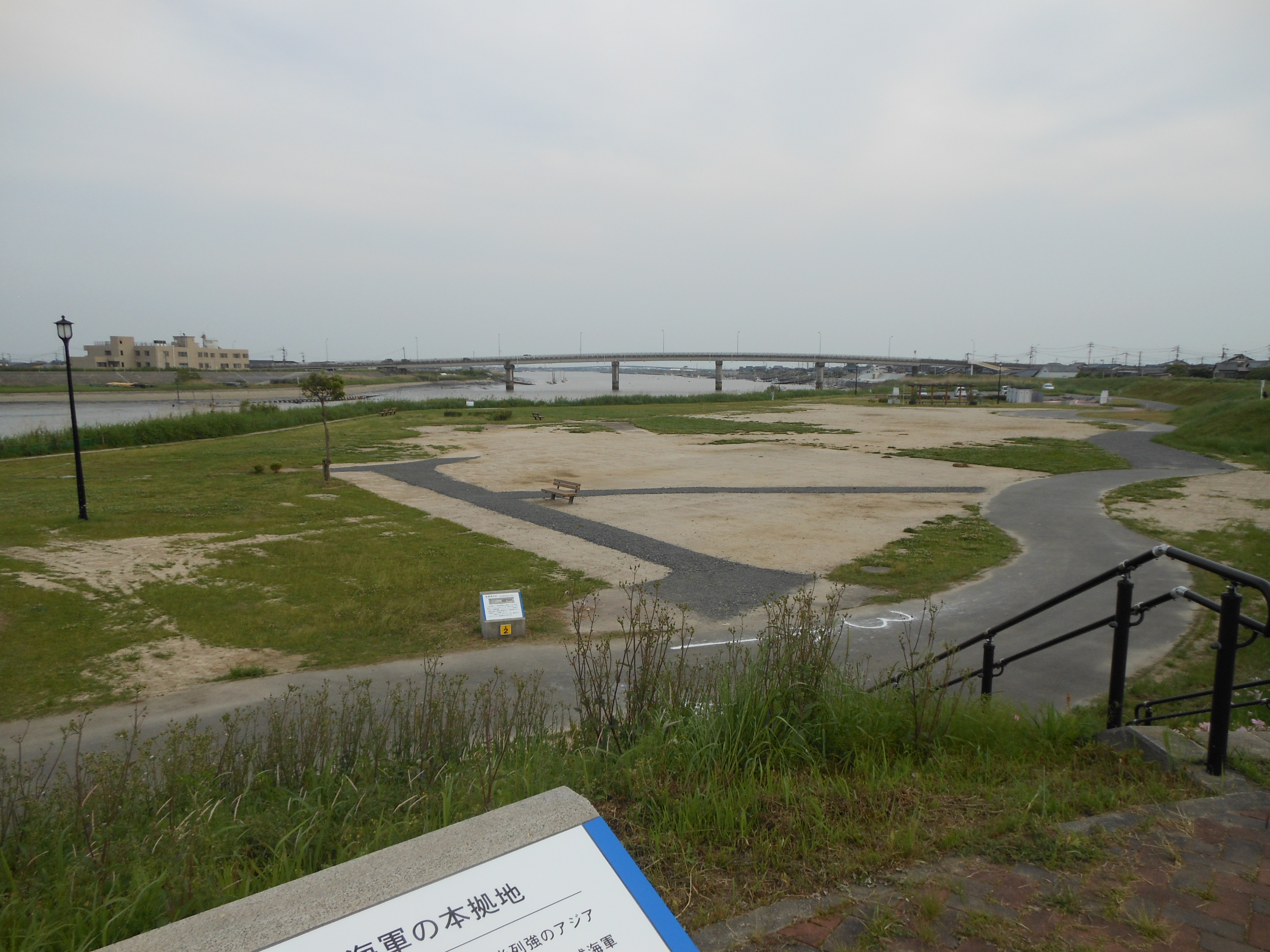 三重津海軍所跡、南側の遠景。奥は早津江川下流、有明海。